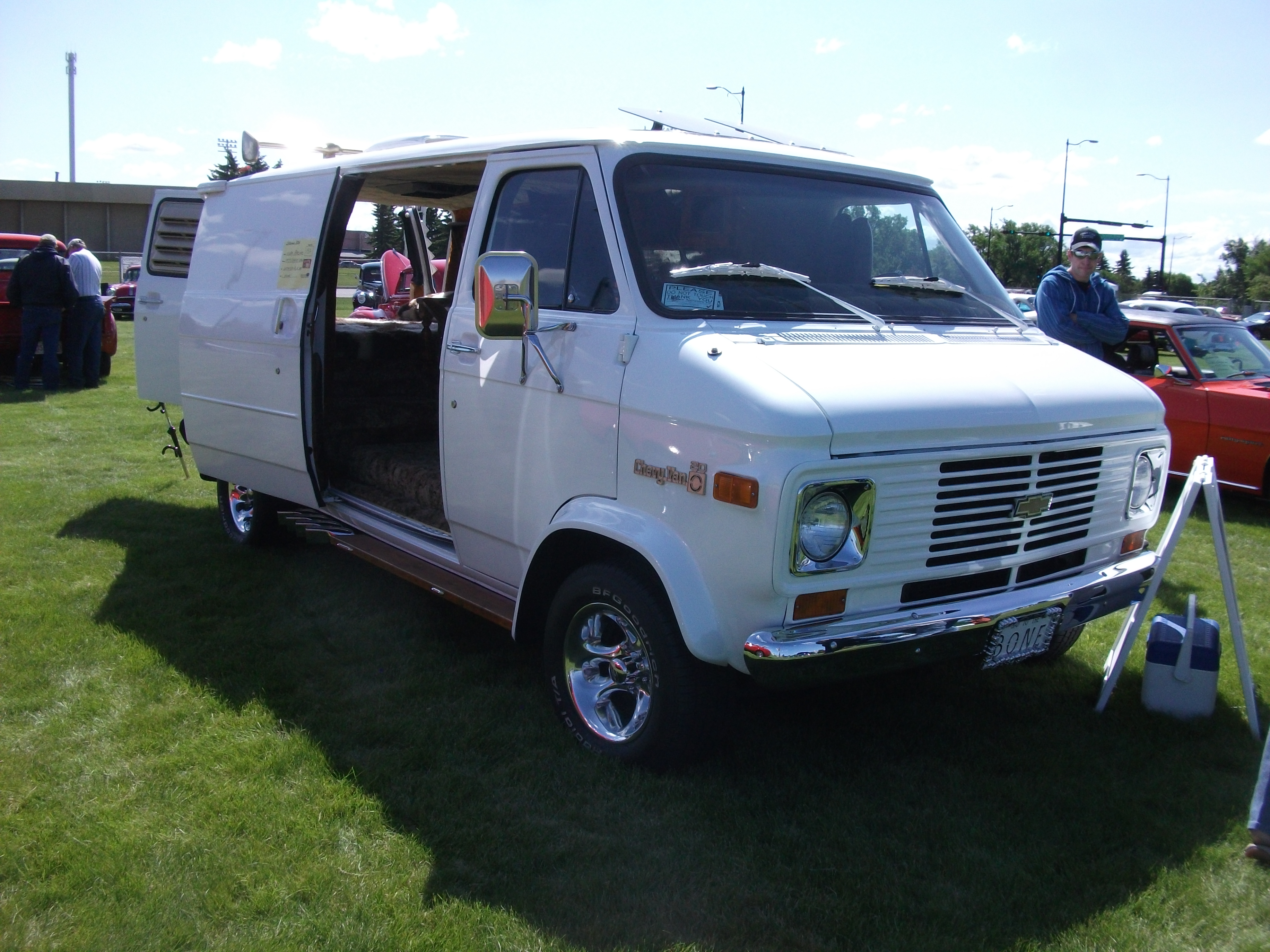 1977 Chevrolet van